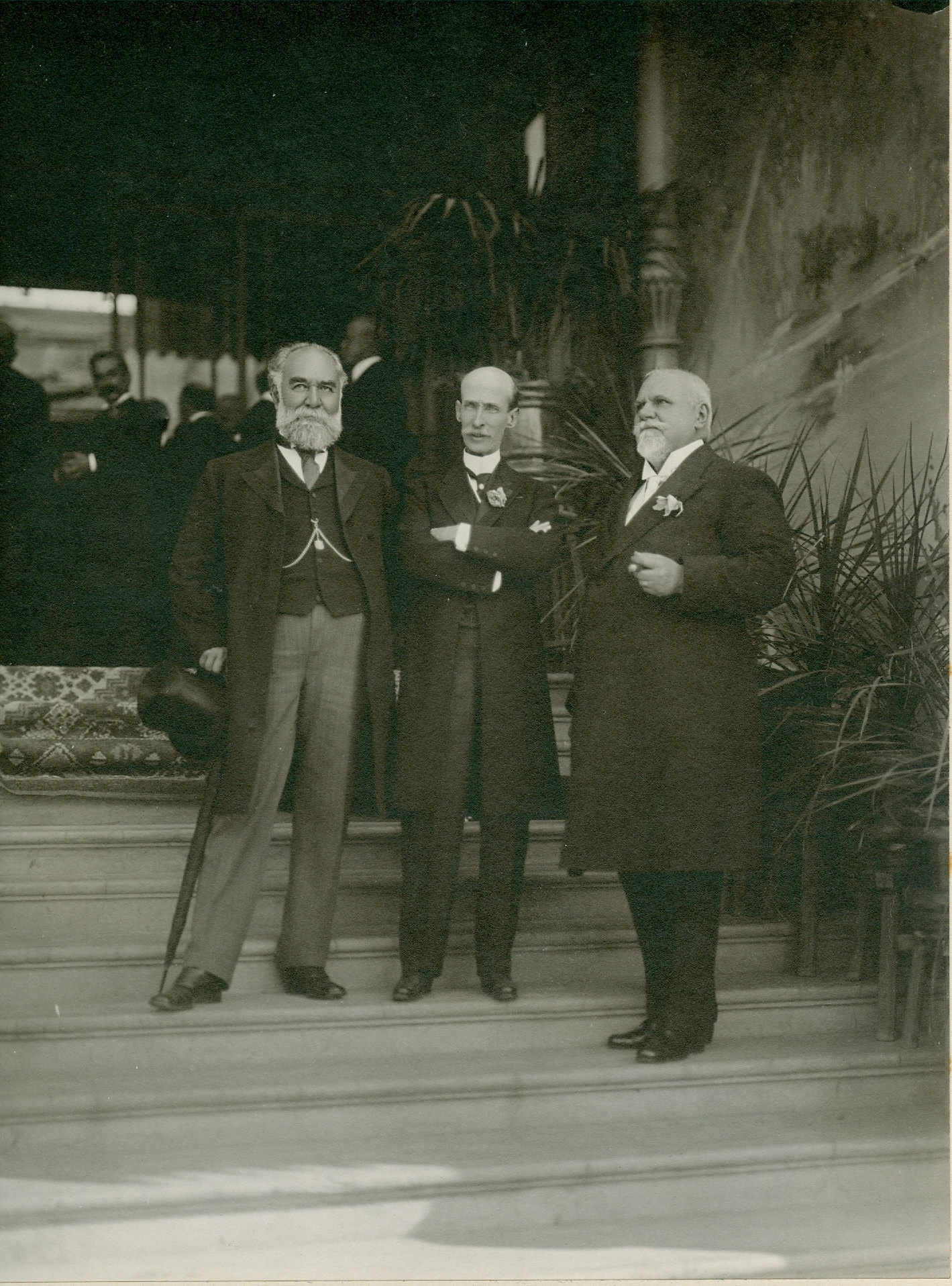 biografia